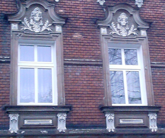 Racibórz, ul. Ogrodowa 10 - kamienica